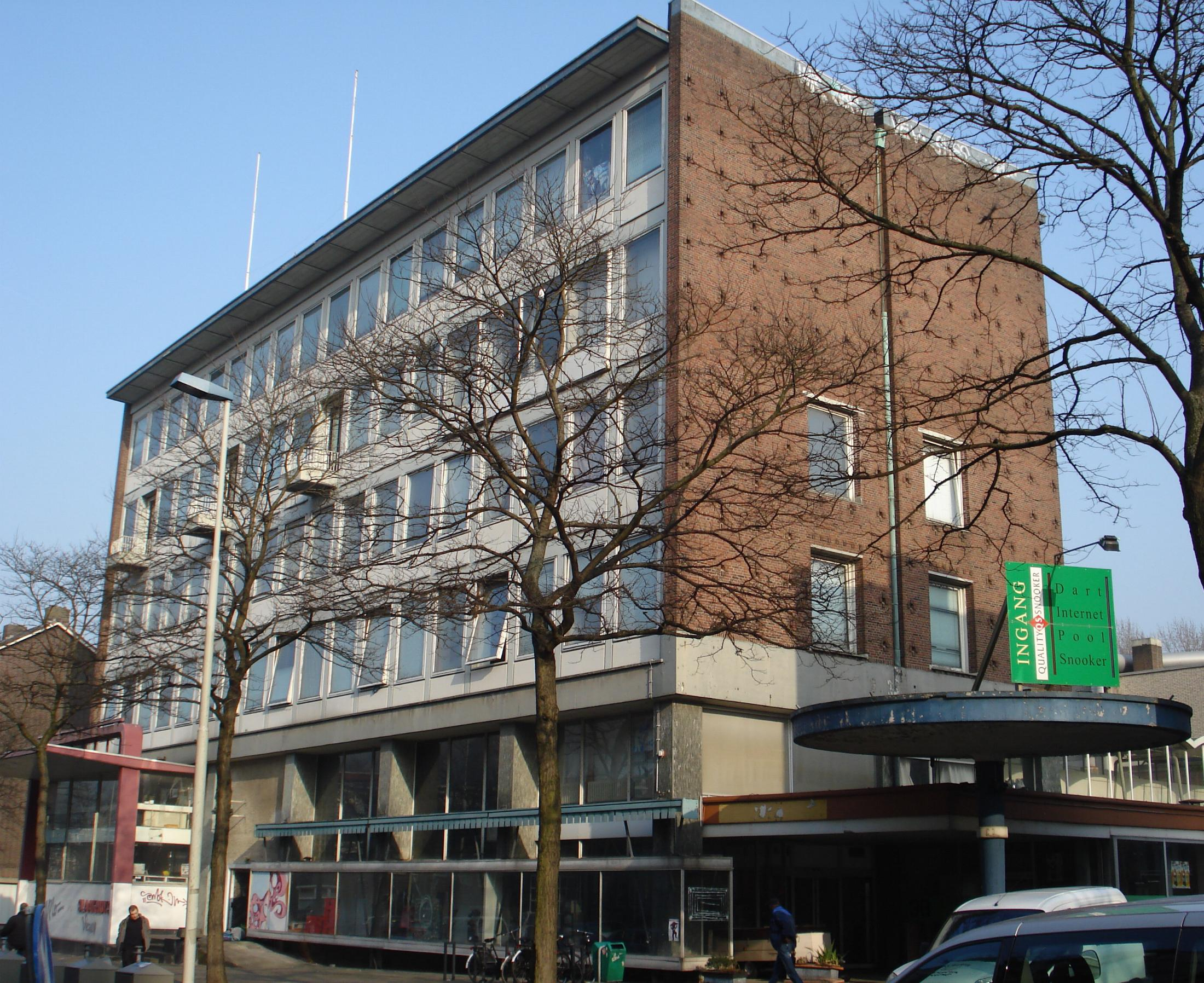 Rotterdam, Slaakhuis. Voorgedragen als rijksmonument, oktober 2007.